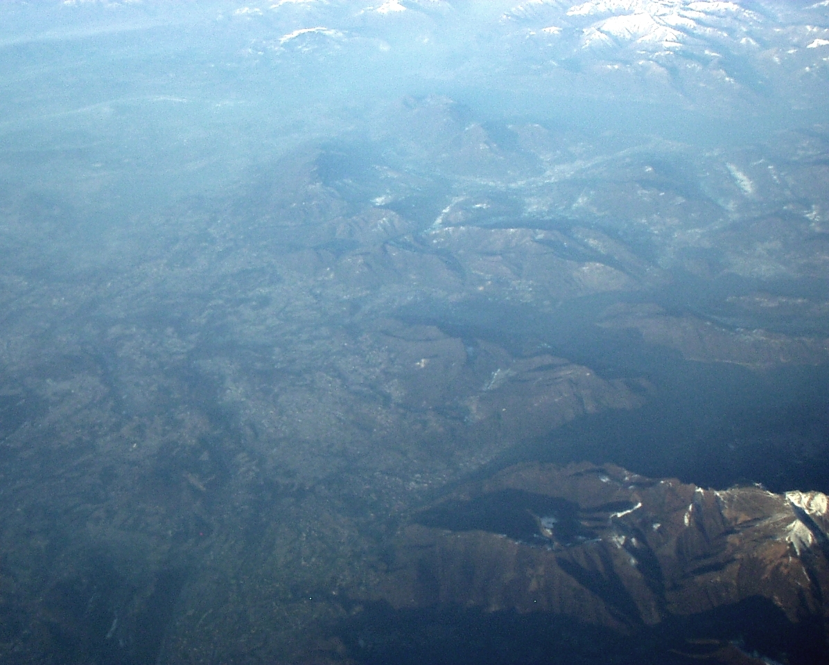 Mendrisio, Hintergrund nordwestliche Lombardei (Varese)